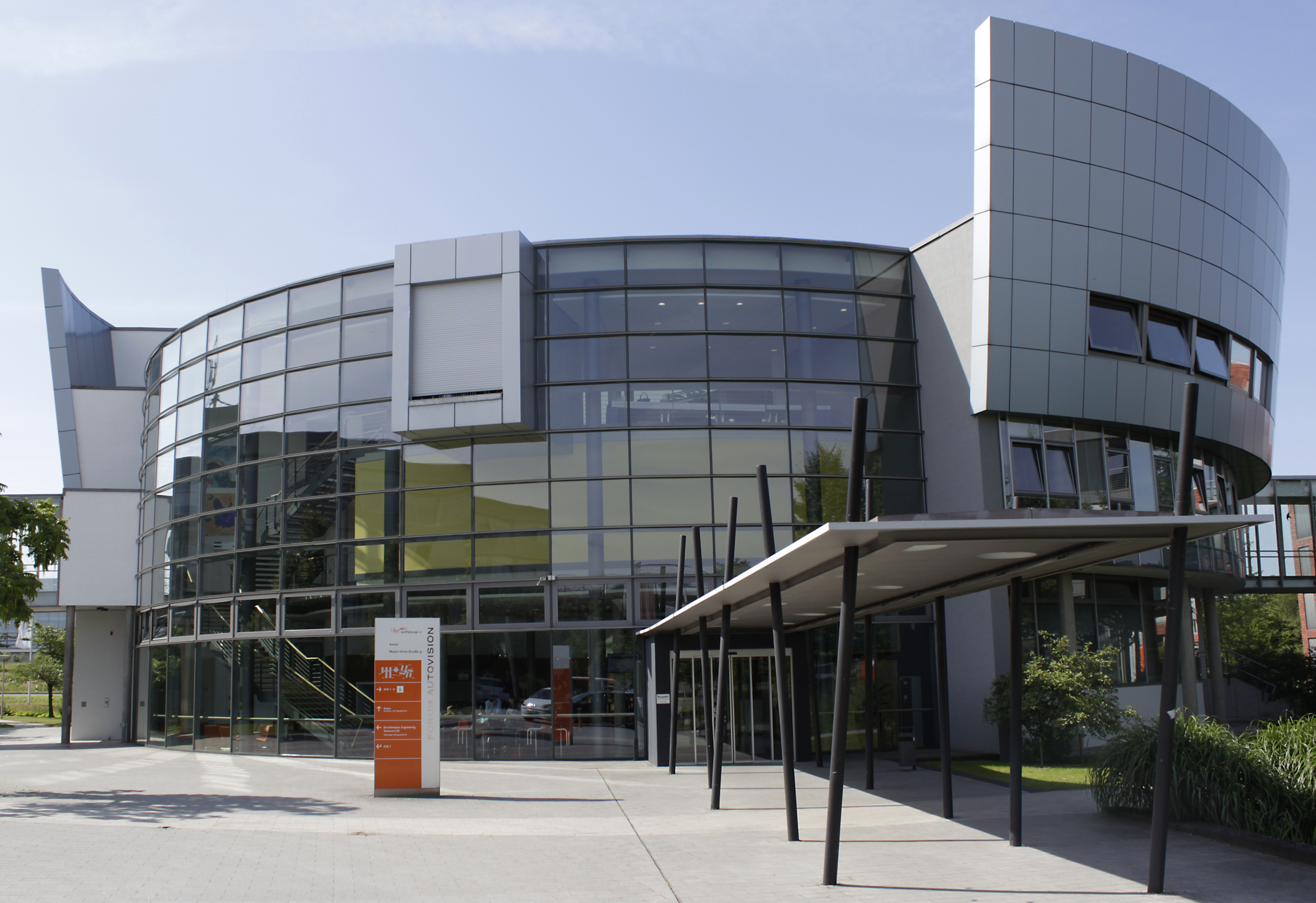 Forum AutoVision Arena in Wolfsburg